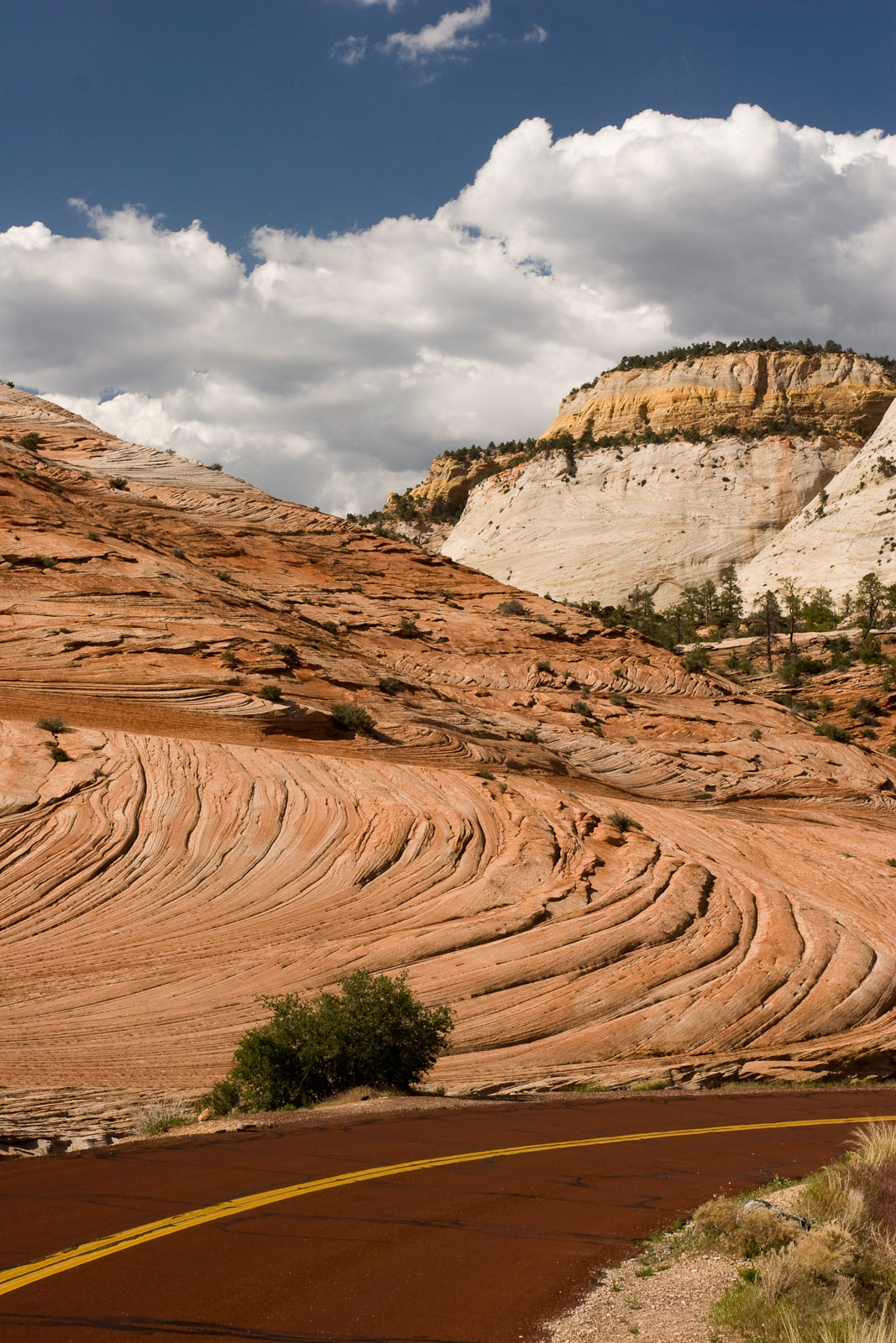 Navajo sandstone